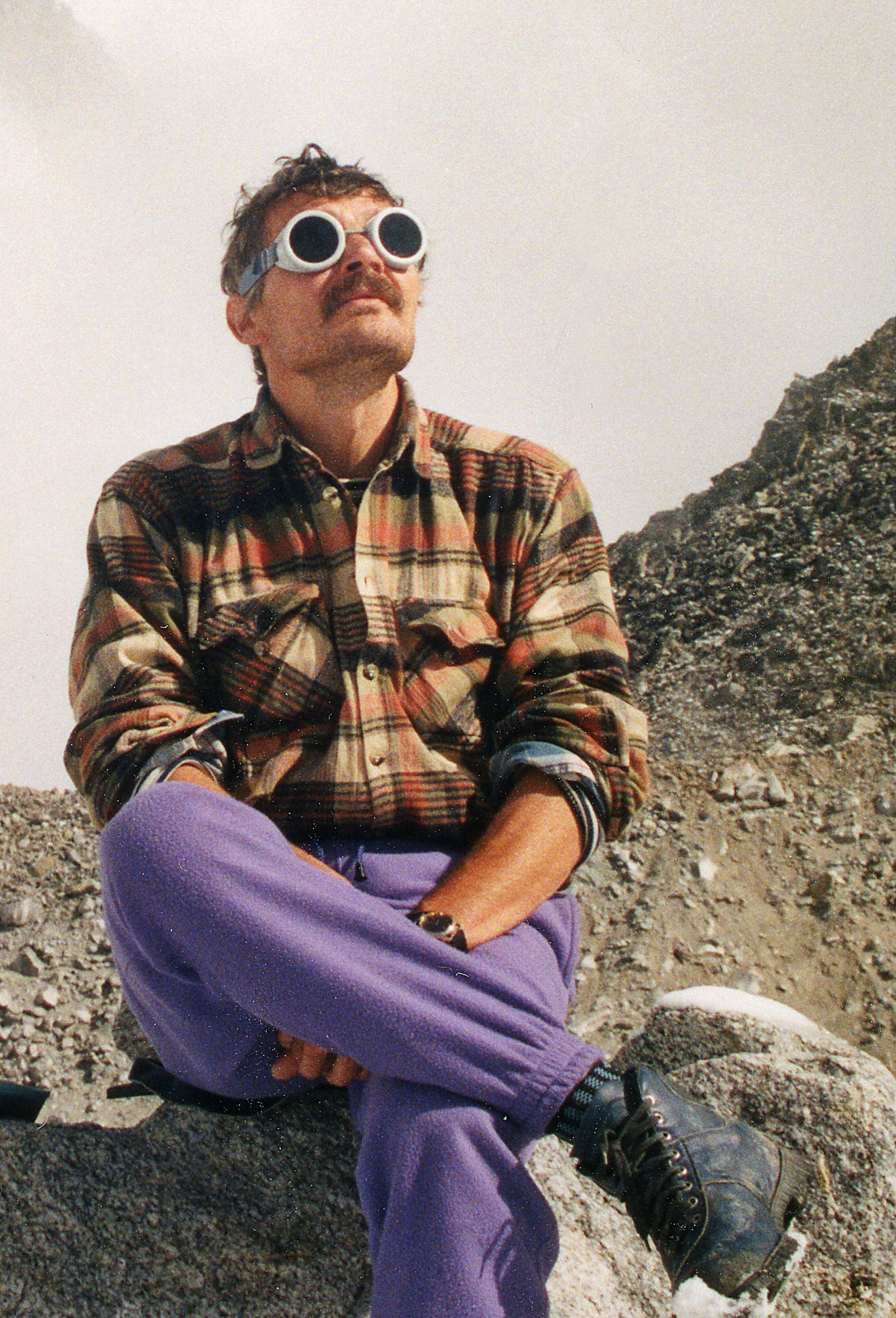 Tõivo Sarmet